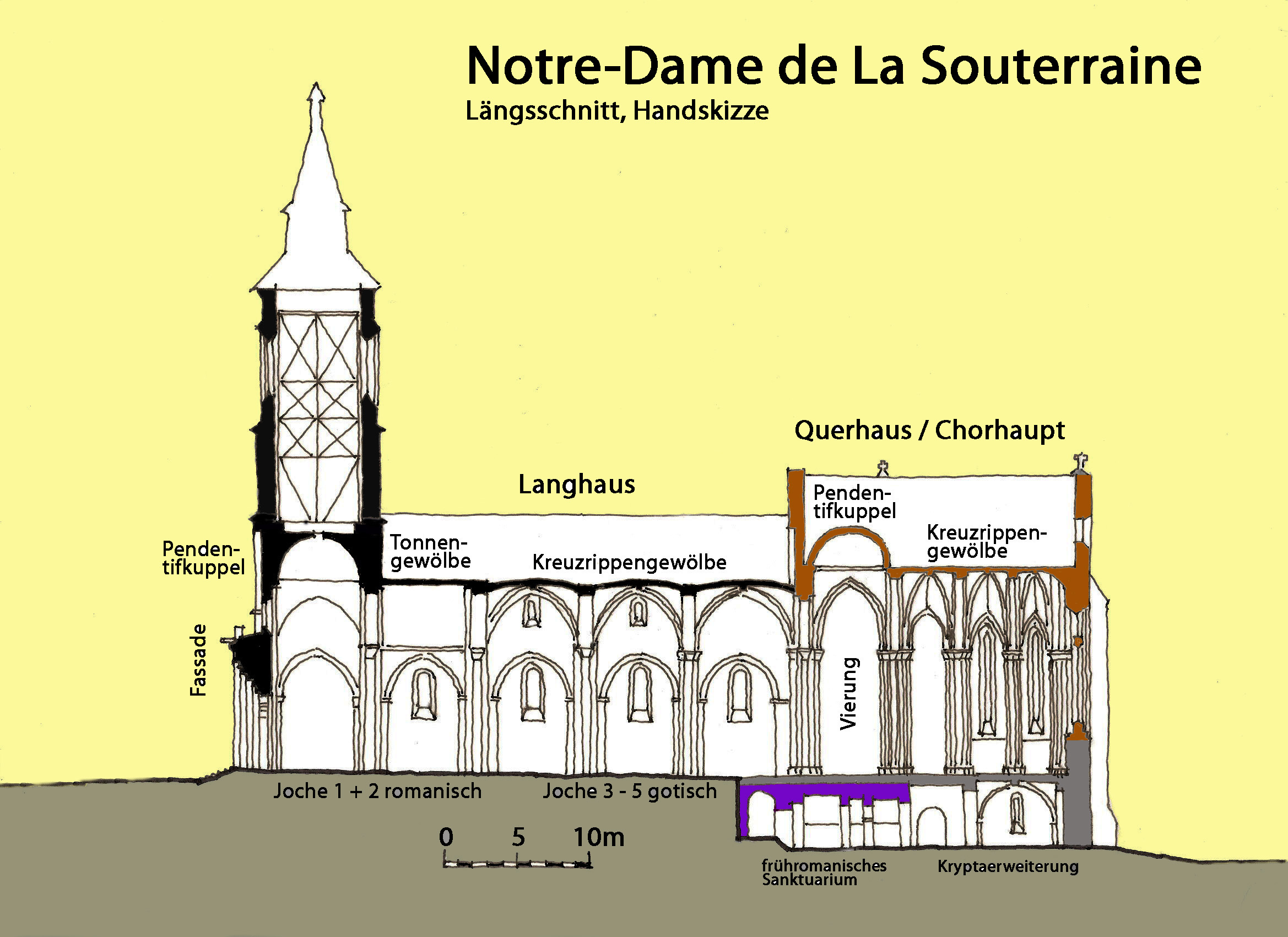 N.-D._de_La_Souterraine.Längsschnitt, Handskizze